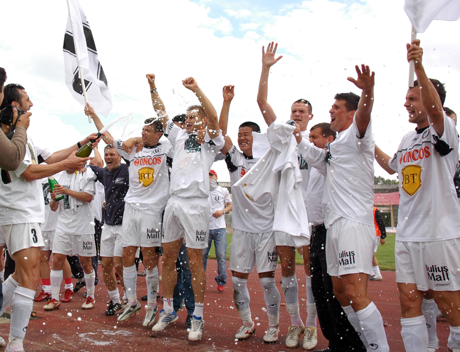 Poza Stadionului Ion Moina în 29 07 2007.